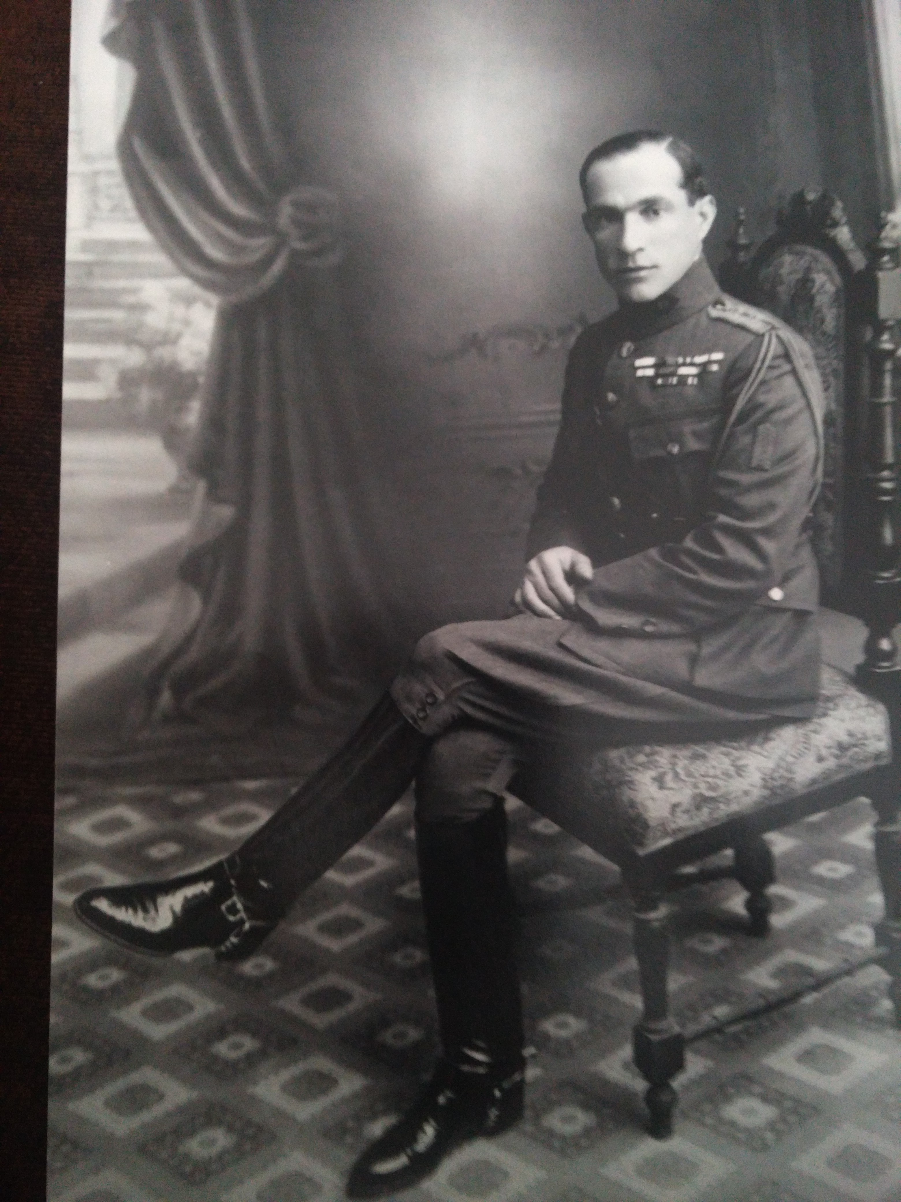 Ιγνάτιος Καλλέργης νεανικά χρόνια